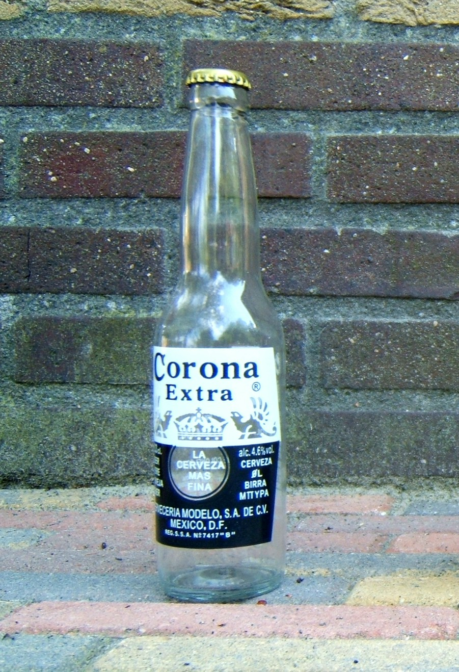 Corona